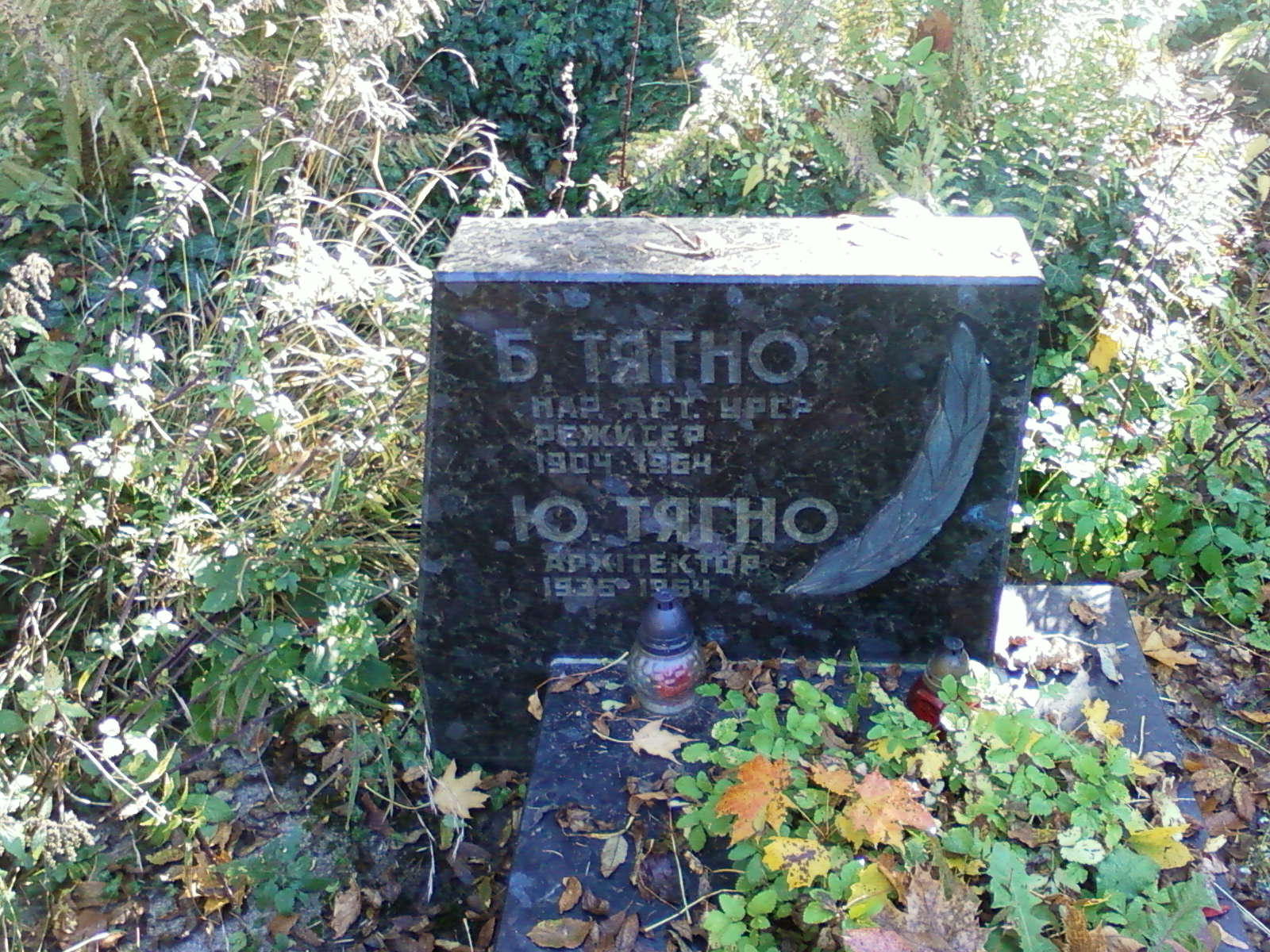 Могила Бориса Фомича Тягно (1904—1964), украинского советского театрального деятеля, кинорежиссёра и педагога, народного артиста Украинской ССР на Лычаковском кладбище (Львов)